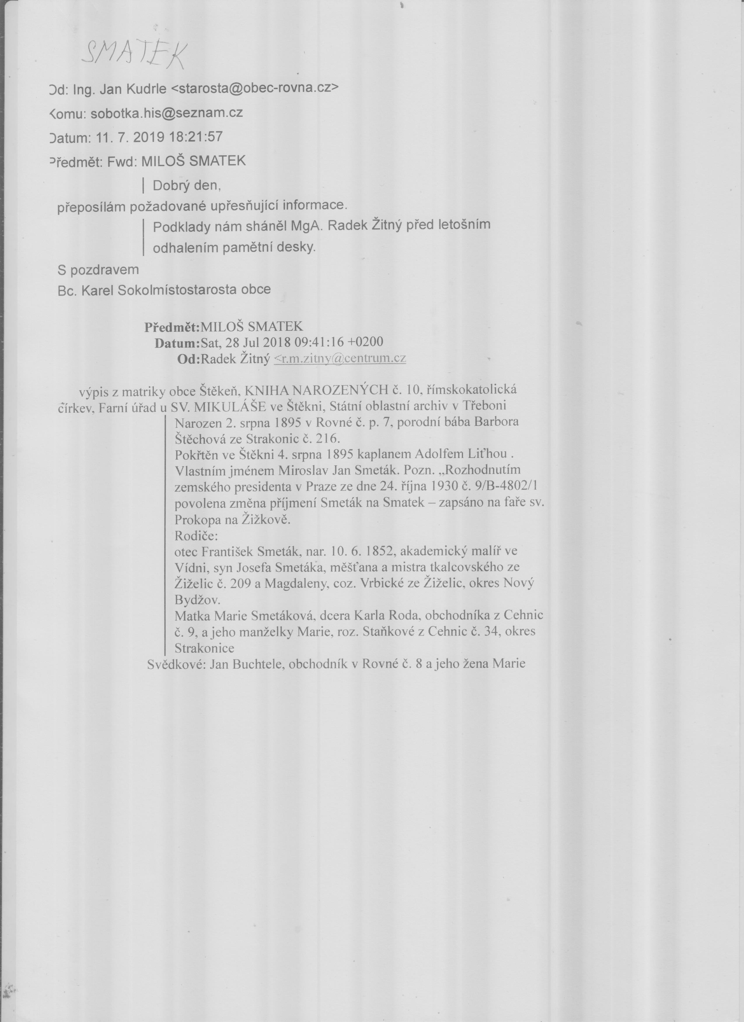 Smatek-narození-matrika-výpis